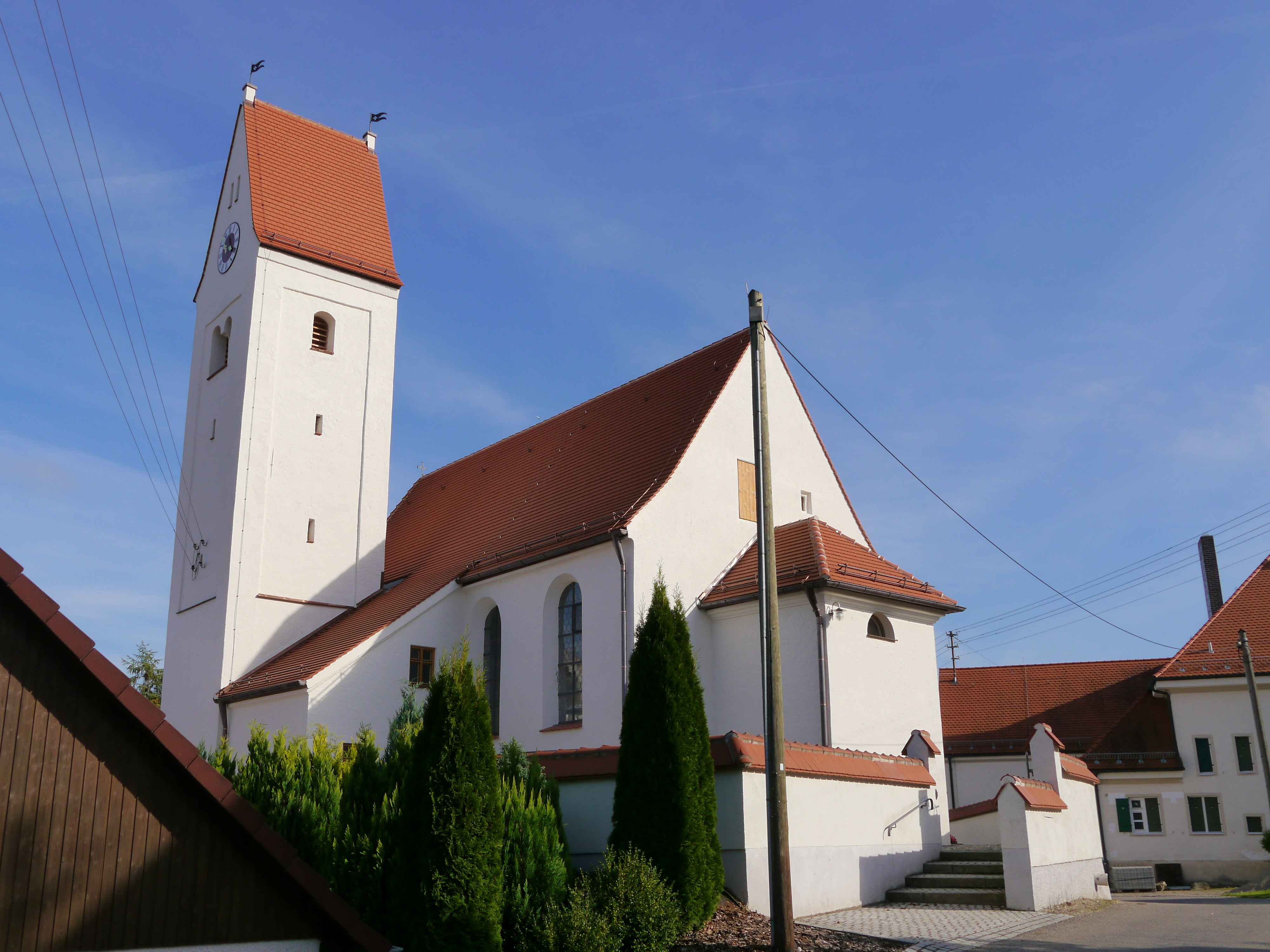 Katholische Pfarrkirche St. StephanThis is a photograph of an architectural monument.